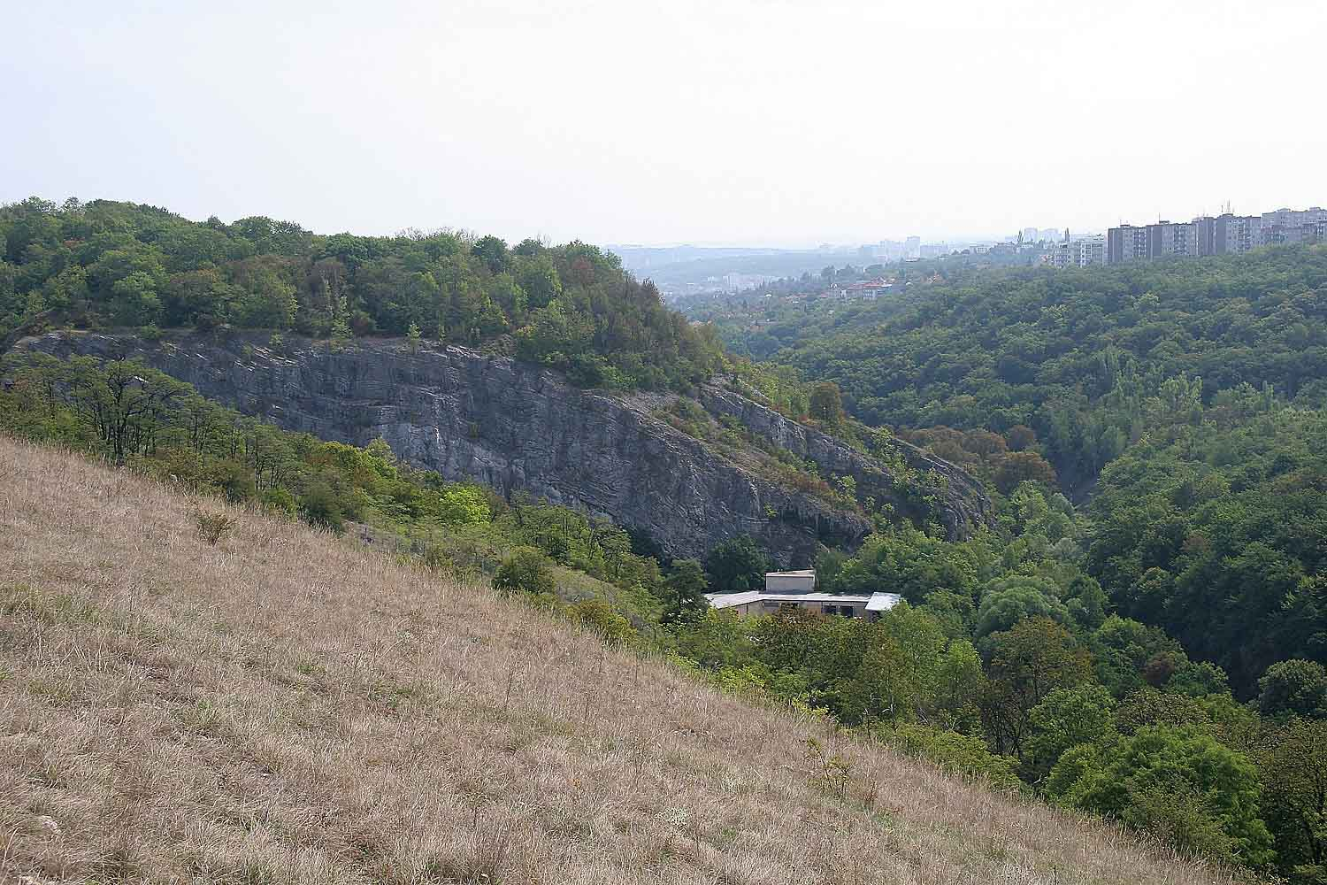 Natural Reserve Prokopské údolí, Praha, Czech Republic Prokopský lom autor: Prazak date: 16. 8. 2006